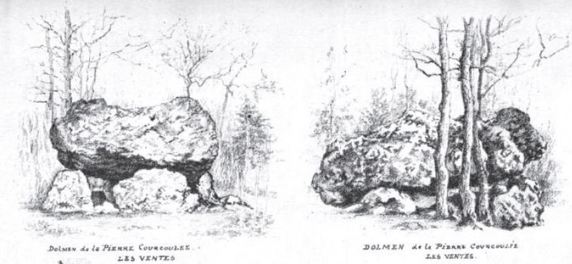 Dessin représentant le dolmen de la Pierre Courcoulée aux Ventes dans l'Eure réalisé par Léon Coutil et publié en 1897